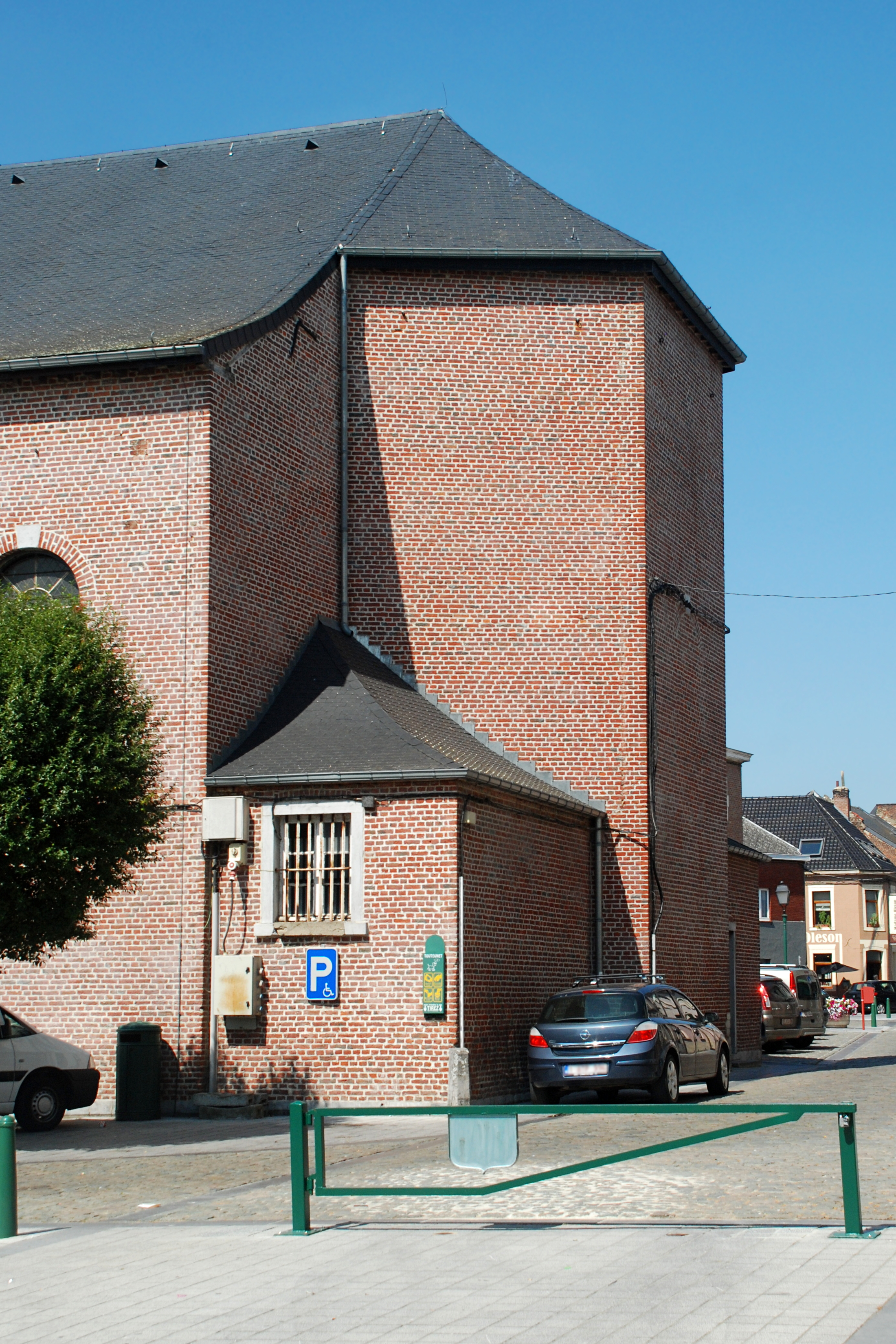 Belgique - Wallonie - Église Saint-Jean l'Évangéliste de Genappe